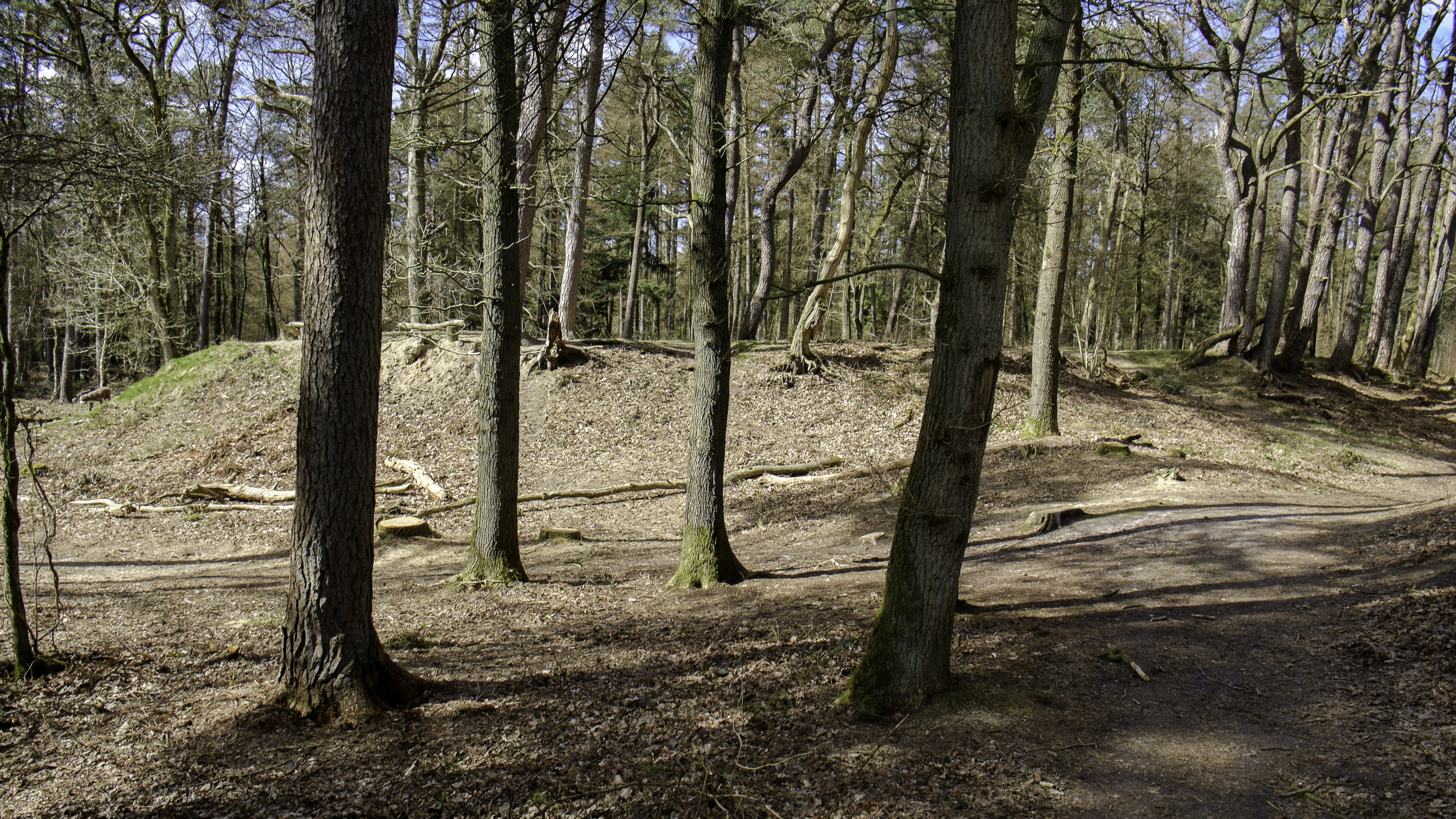 Het zogenoemde Heilig Bergje in het Noordlaarderbos